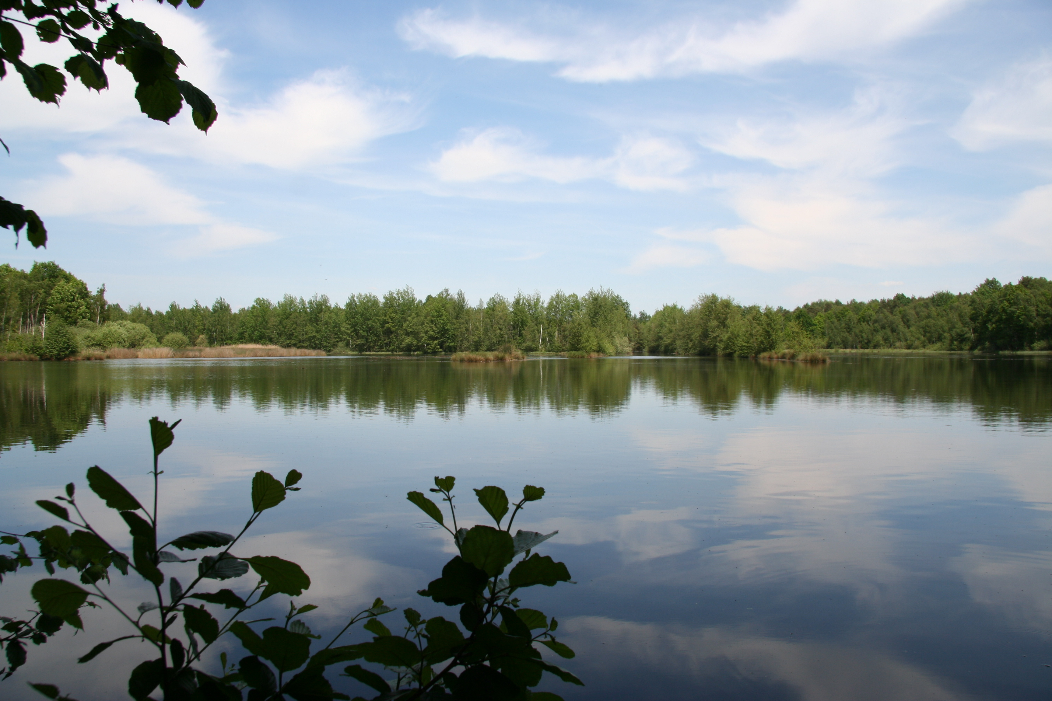 Im Naturschutzgebiet "Schmielteich Polenz", Landkreis Leipzig, WDPA-ID: 319083